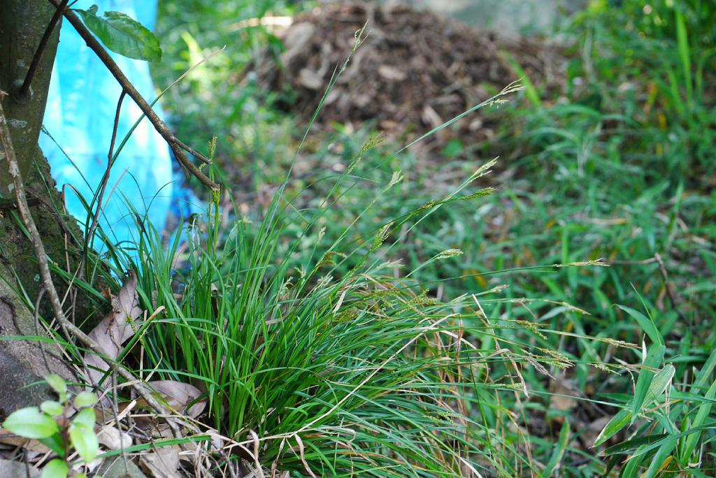 Carex tristachya Moegisuge モエギスゲ（カヤツリグサ科） 2013年5月12日 和歌山県田辺市